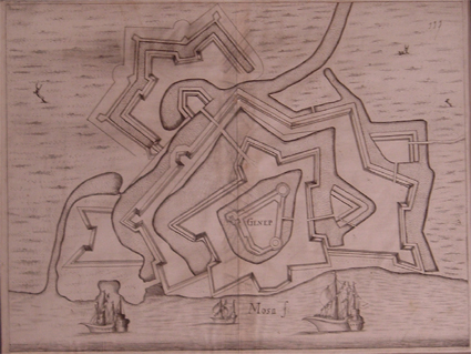 17de eeuwse ets